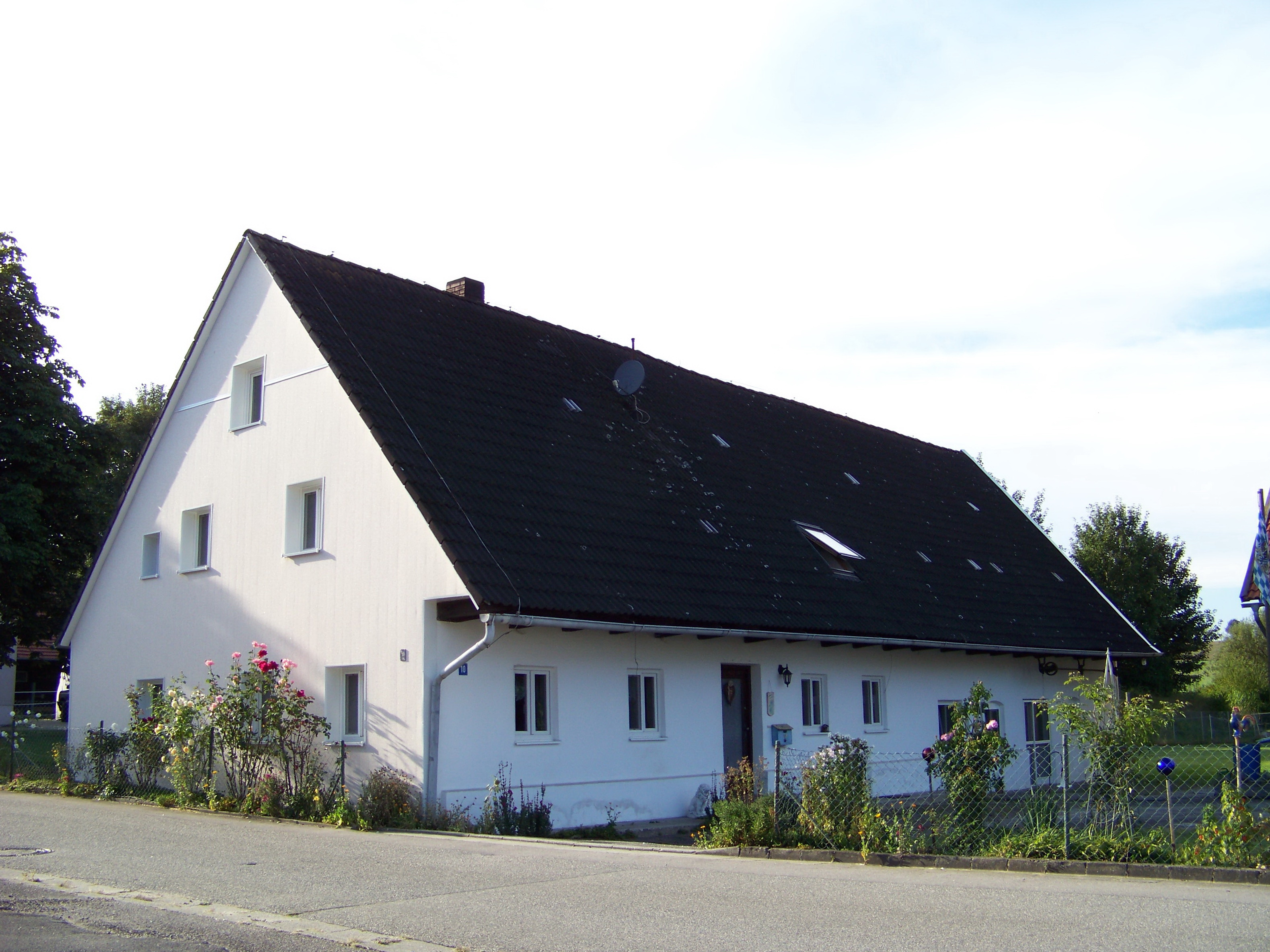 Pfeffenhausen, Tabakried, Haus Nr. 10. Wohngebäude eines ehemaligen Hakenhofs. Eingeschossiger Massivbau mit Greddach, erste Hälfte 19. Jahrhundert.